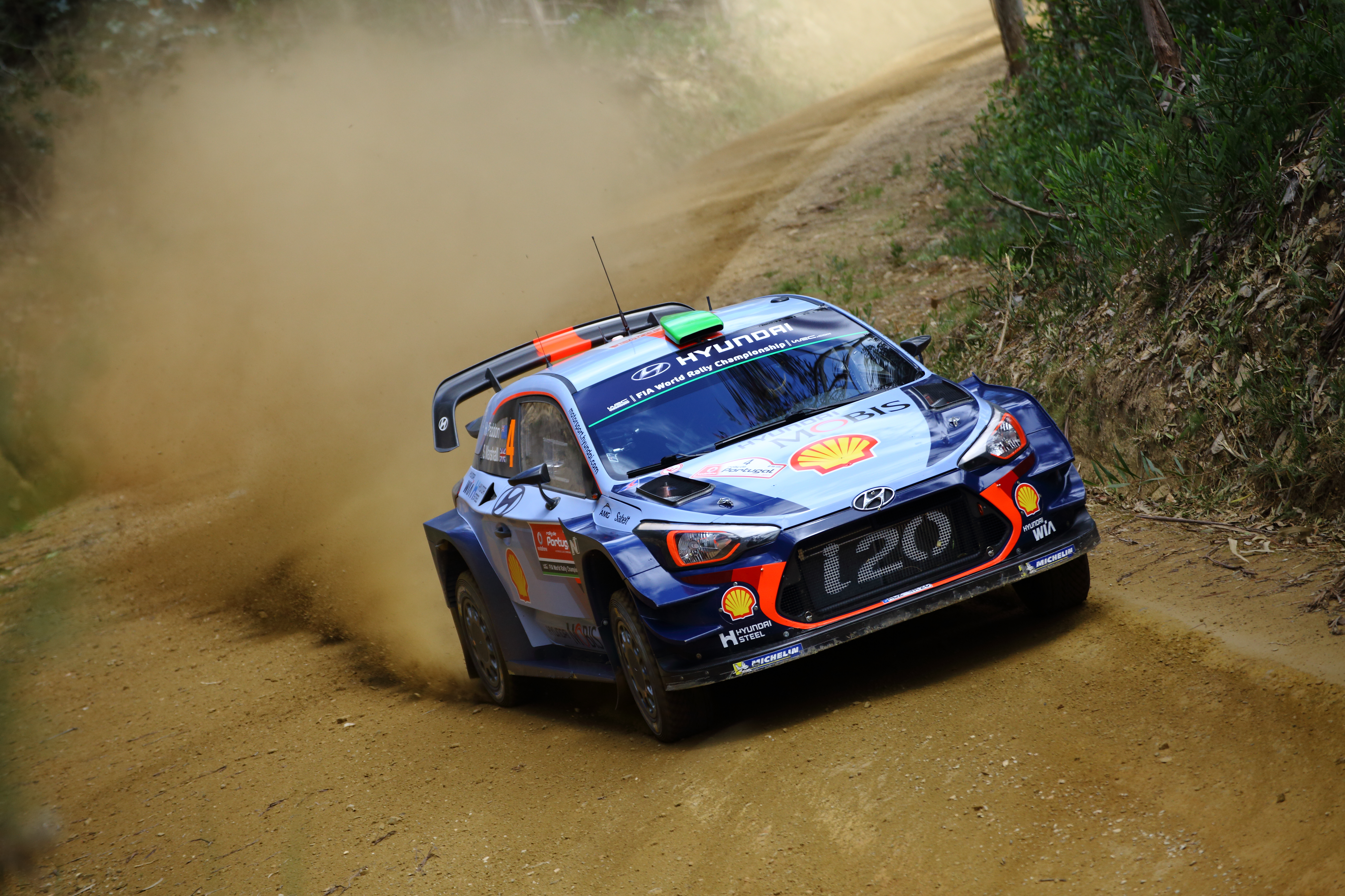 2017 Rally Portugal